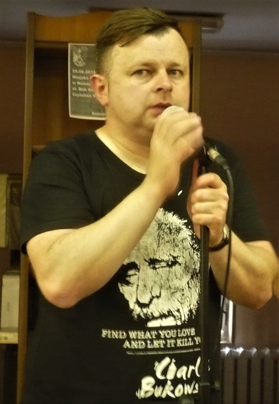 Wojciech Brzoska